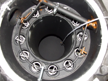 Blick in den geöffneten Kessel einer Pellets-Heizanlage (Paradigma Pelleti, 8 kW). Innen Feuerungsraum, außen die Rauchzüge mit automatischer Reinigung (Federn).